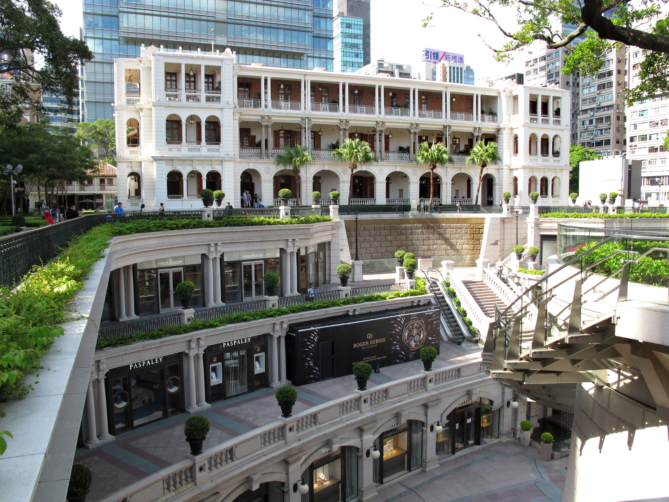 1881 Heritage Overview